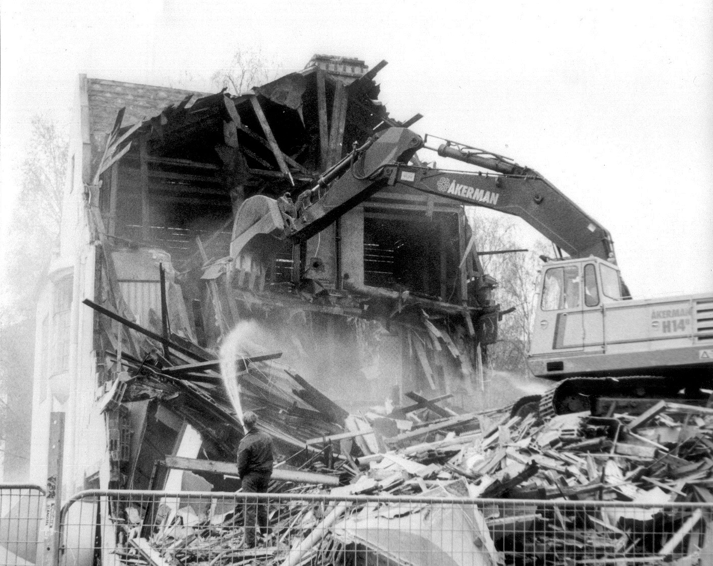 Rivning av jugendhuset i lycksele